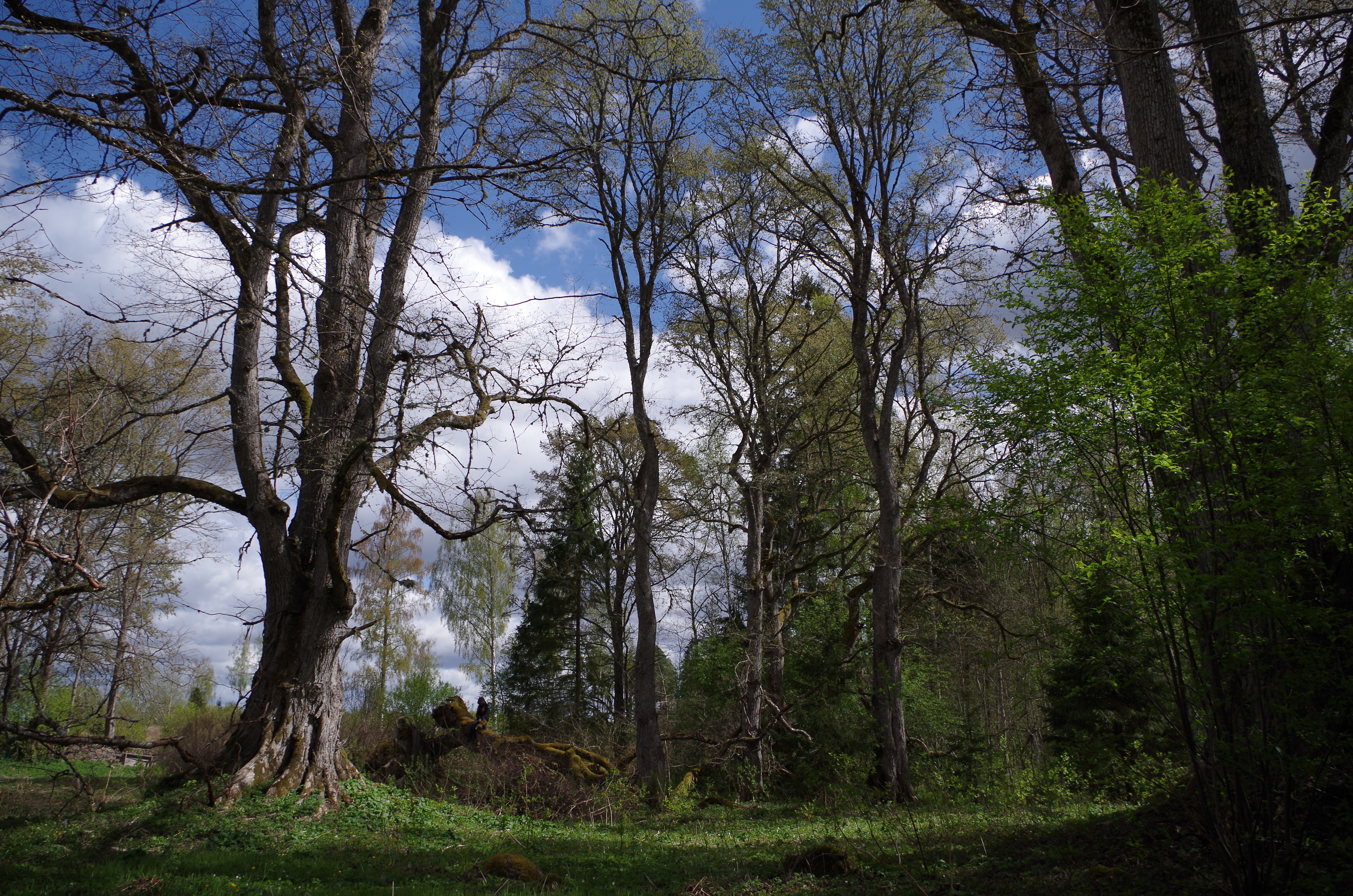 Kiigeoru hiiesalu